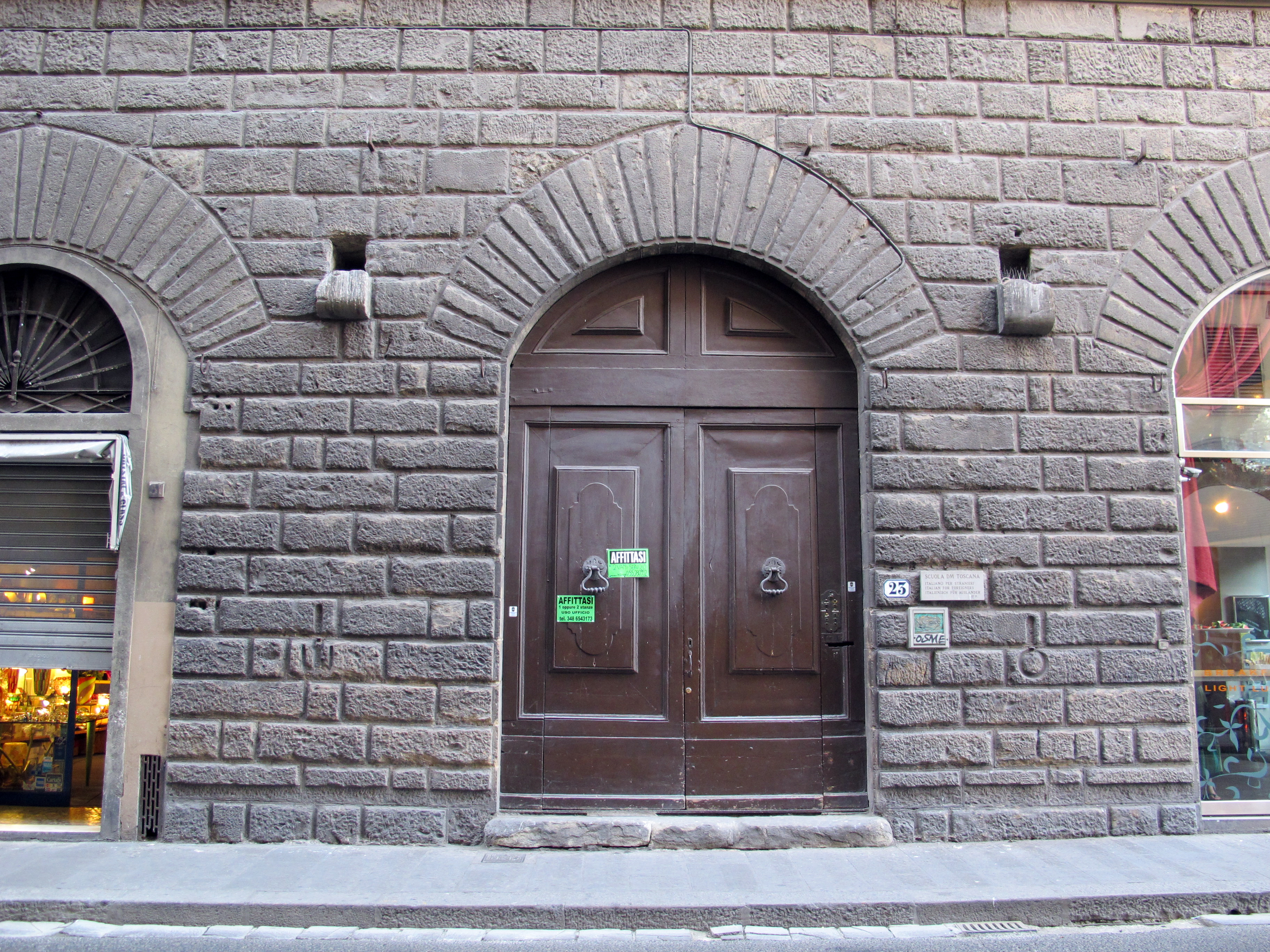 Palazzo Caccia Peruzzi 03 portali